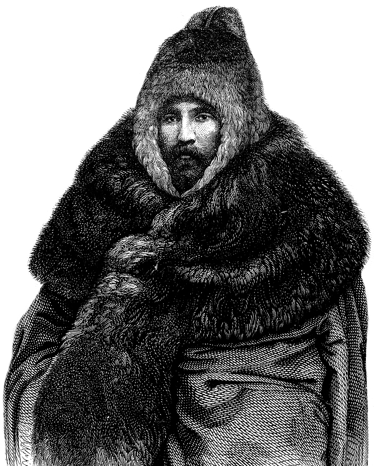 Иван Петрович Алибер (Jean-Pierre Alibert) (1820—1905) в Сибири, 1860 г.